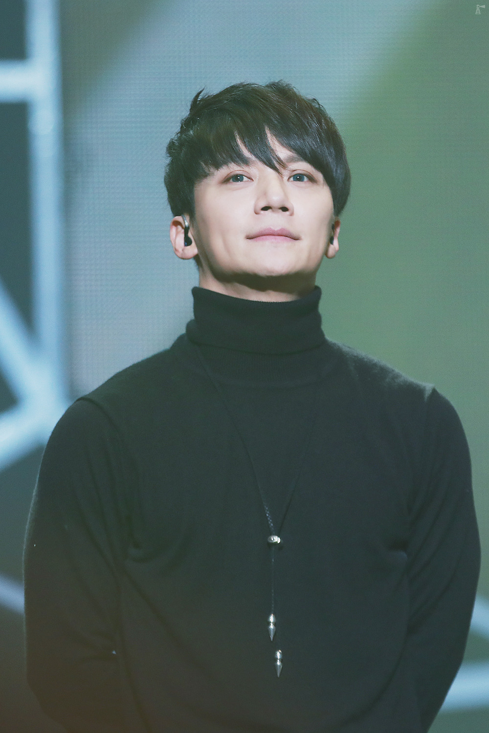 170122 Yellow Note Final 李宰鎮